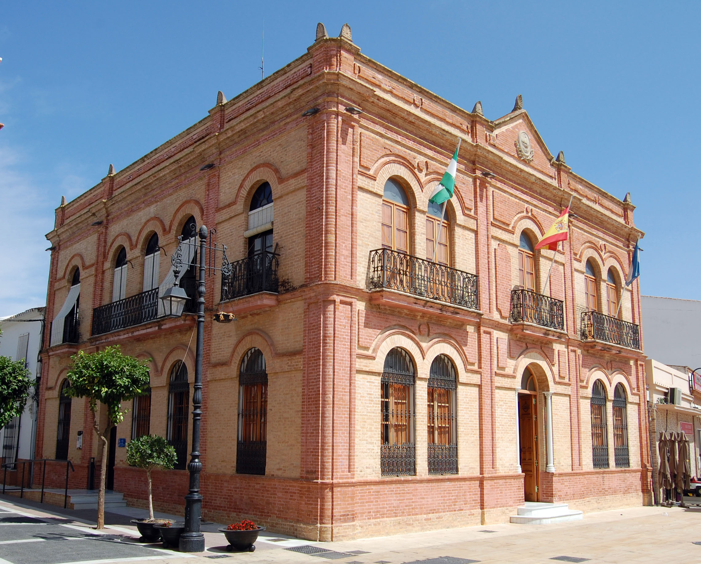 Fachada del Ayuntamiento de San Juan del Puertoedificado en 1902 por Manuel Pérez